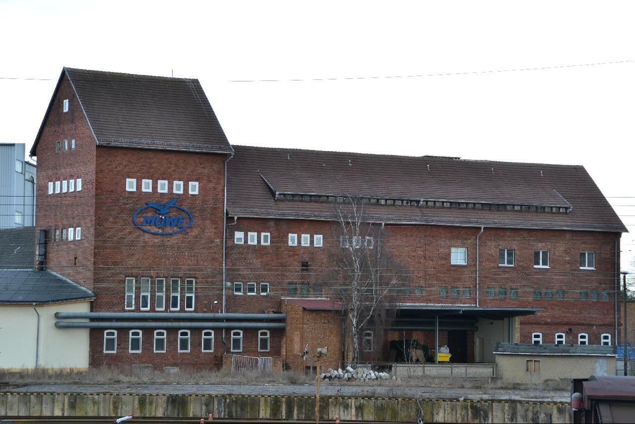 Teigwarenfabrik Möwe in Waren/Müritz